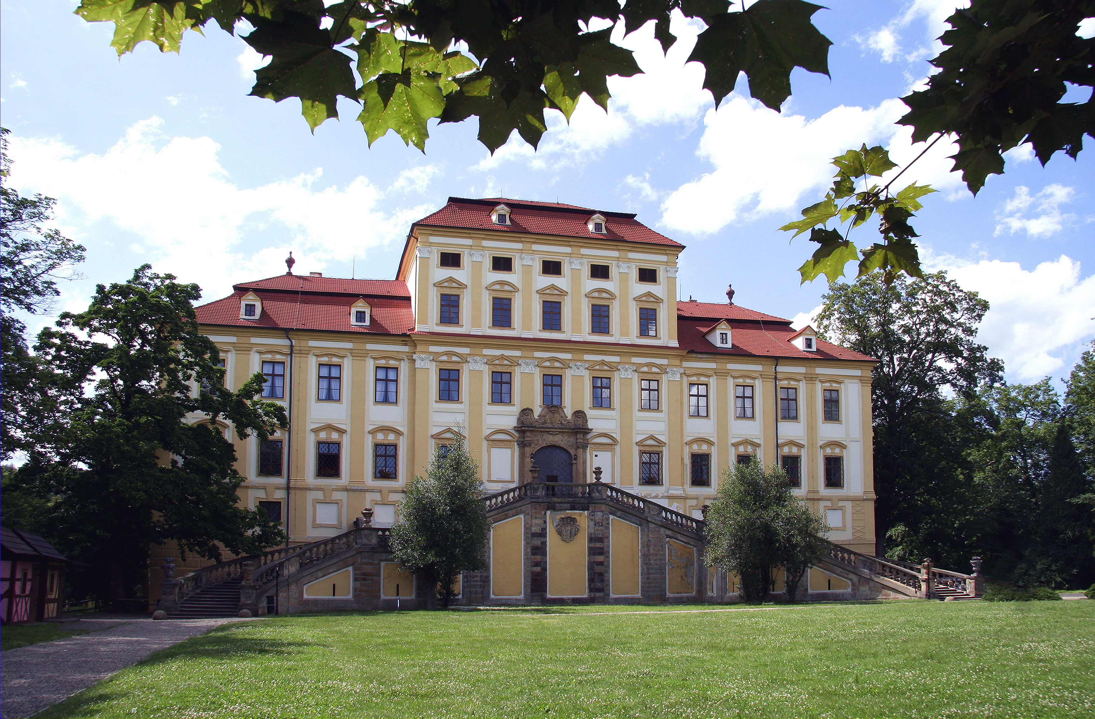 Červený Hrádek (zámek) front view